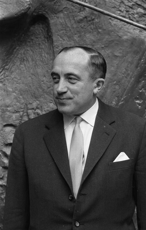 Einweihung der neuen Botschaft der BRD in Paris (Avenue Franklin Roosevelt) in Anwesenheit BM Dollinger